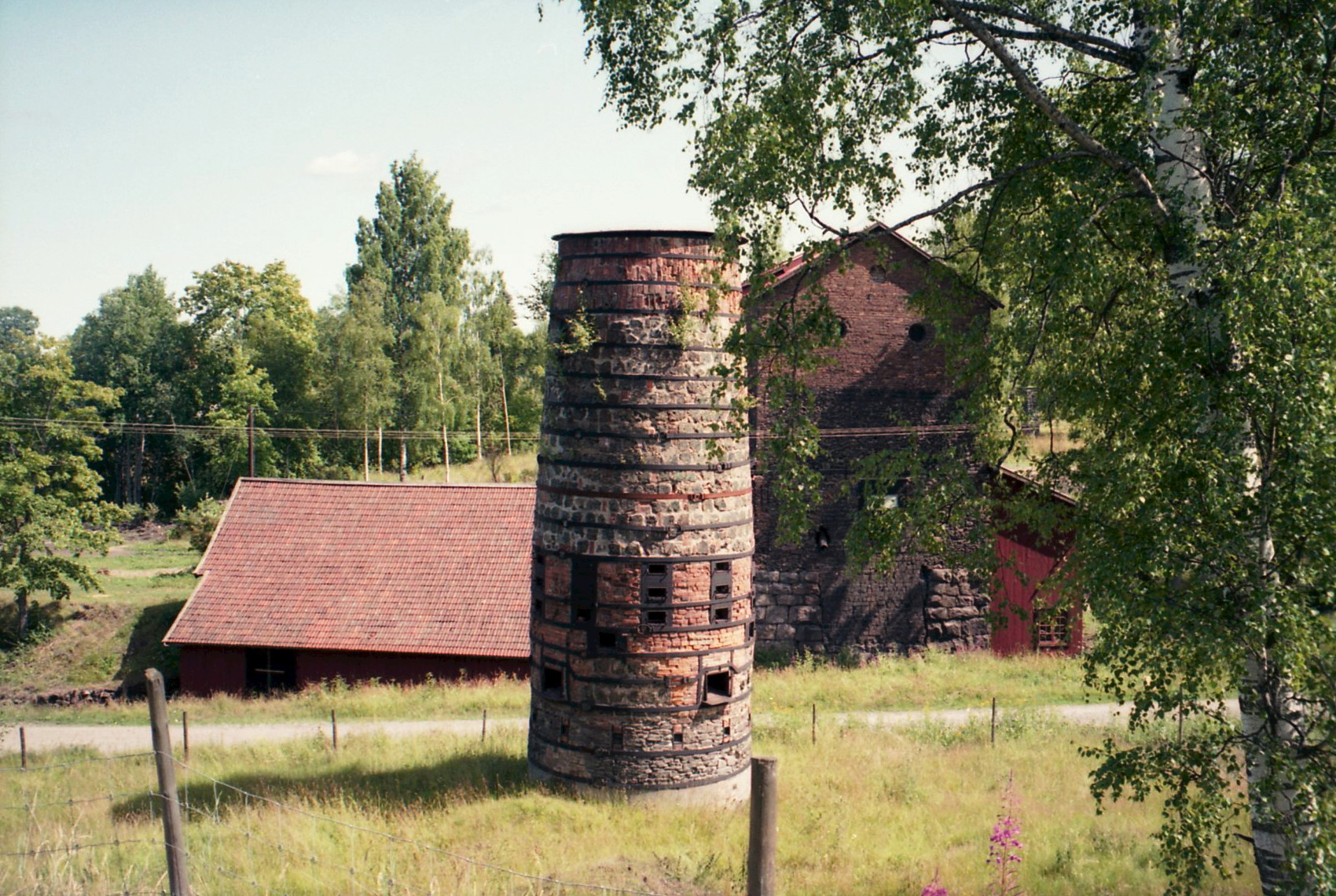 Flatenbergshyttan i Dalarna